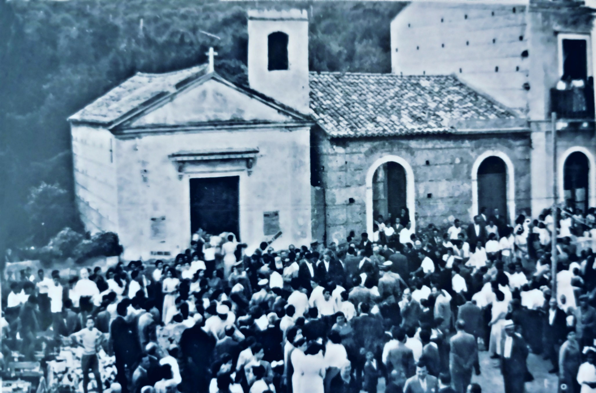 Foto di Santa Maria Assunta, Chiesetta antica.